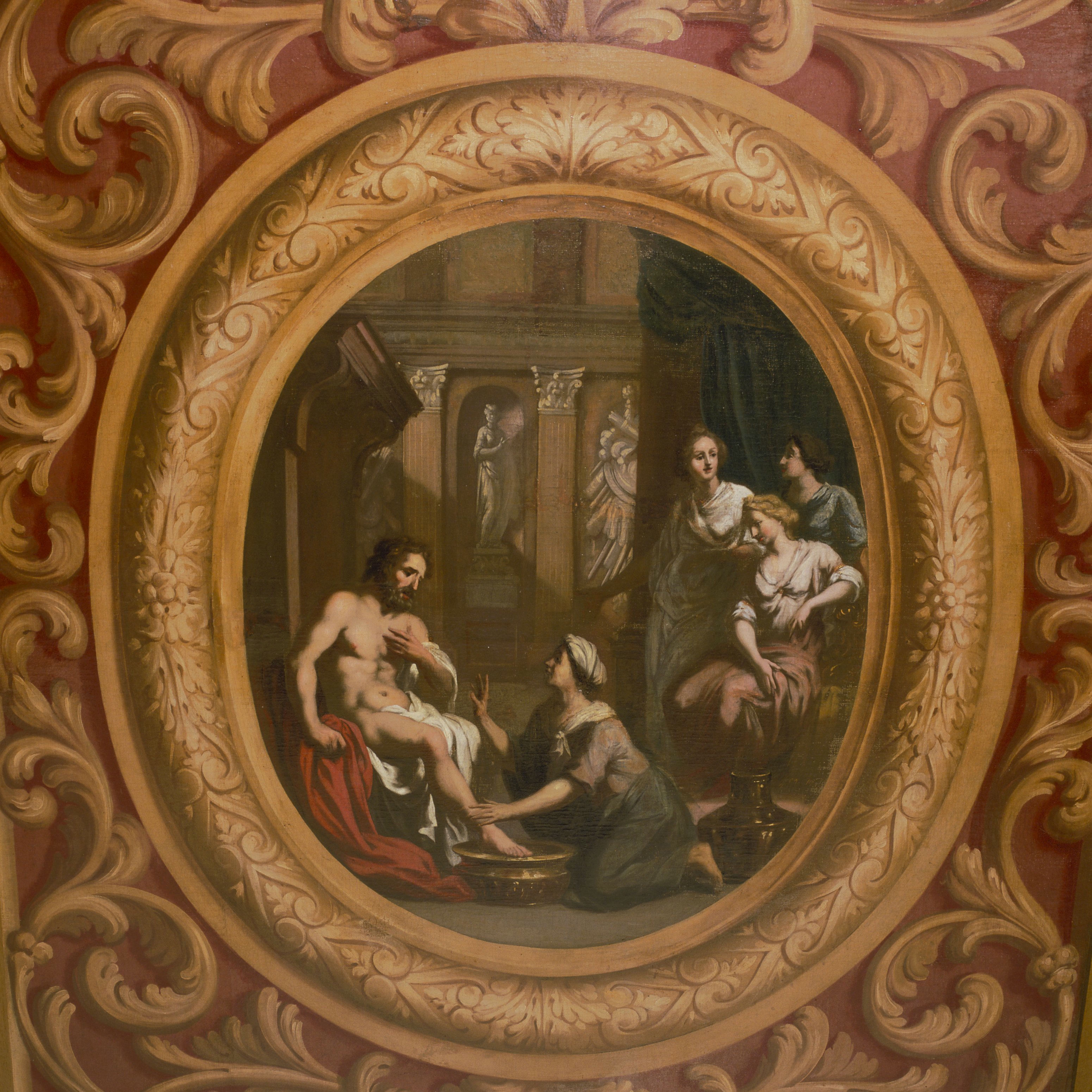 Plafondschildering/ Schildering: Interieur, eerste verdieping, voorzijde rechts (rechter voorkamer), plafondschildering, Eurykleia was de voeten van Odysseus (opmerking: Inventarisatie Decoratieve Interieurschilderingen in Nederland (1600-1940), i.s.m. RKD)